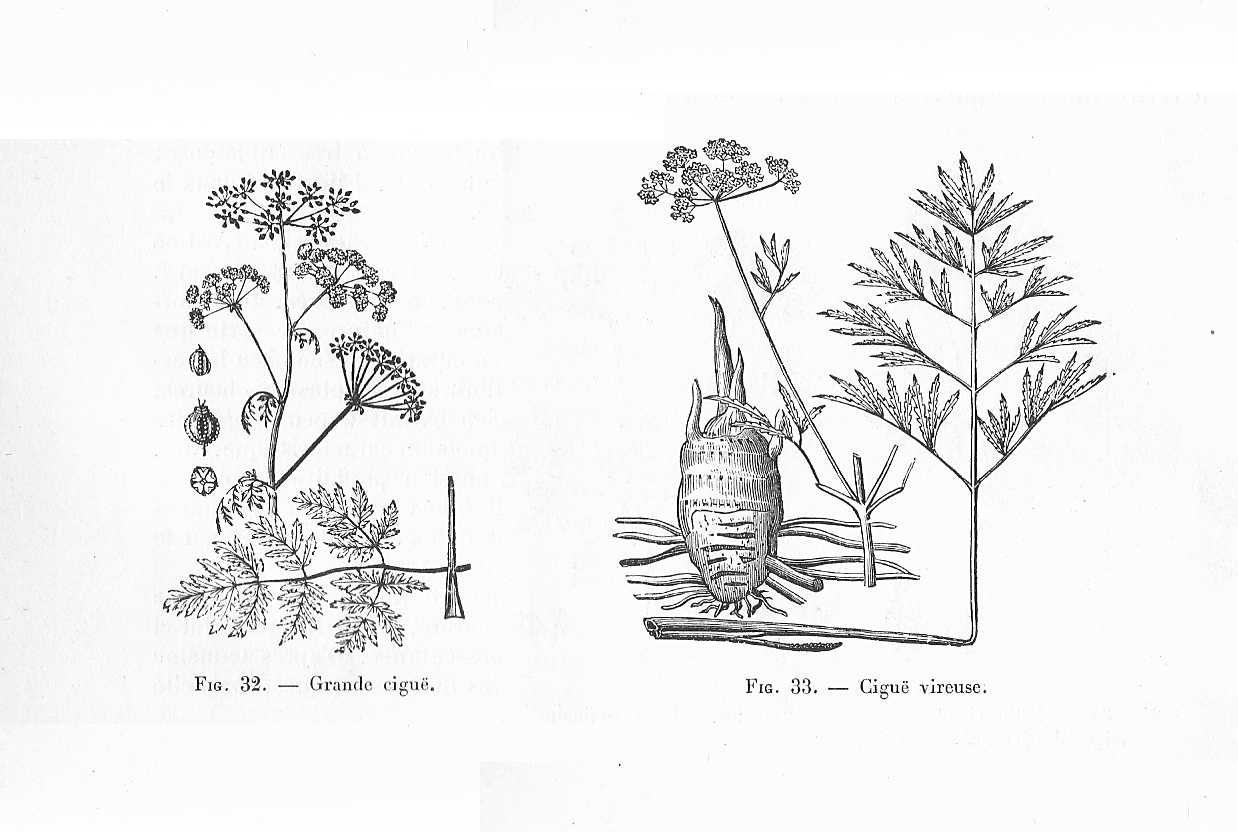 Grande ciguë & Ciguë vireuse (dessins)